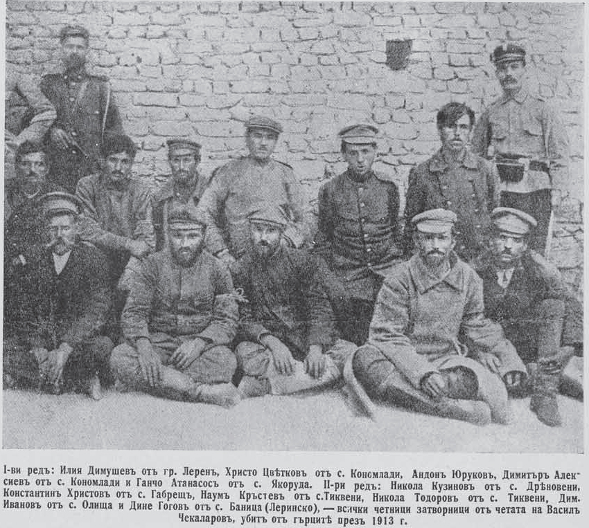 Заловени четници на Васил Чекаларов. Вестник „Емброс“, юли 1913 година. На първия ред отляво надясно: Илия Димушев от Лерин, Христо Цветков от Кономлади, Антон Юруков от Солун, Димитър Алексиев от Кономлади, Ганчо Танасеско (Атанасов) от Якоруда. На втория ред отляво надясно: Никола Филипов от Дреновени, Константин Христов от Габреш, Наум Кръстев и Никола Тодоров от Тиквени, Димитър Иванов от Олища, Константин Кръстев от Баница